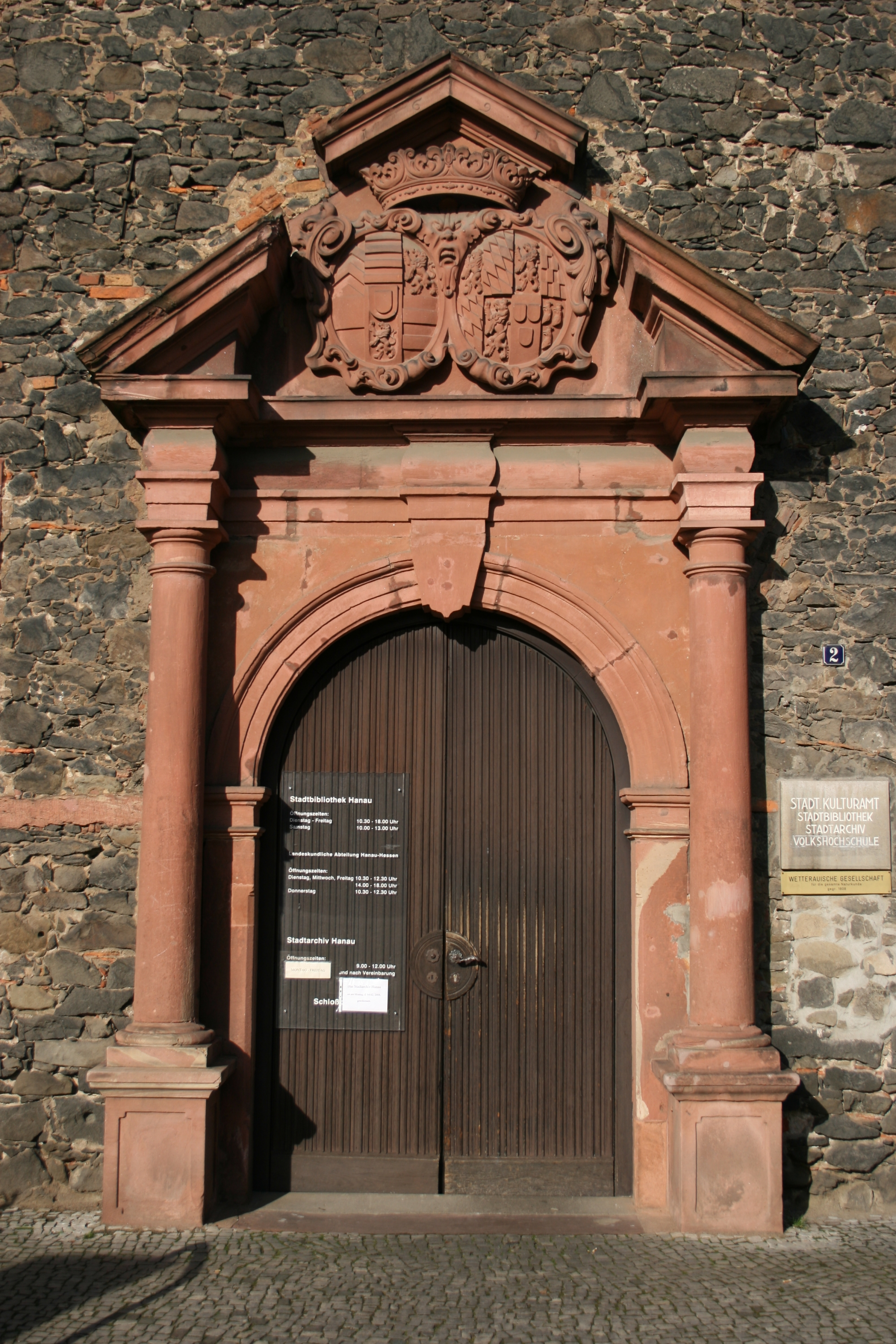 Stadtschloss Hanau, Portal des Kanzleibaus mit Wappen und Jahreszahl.